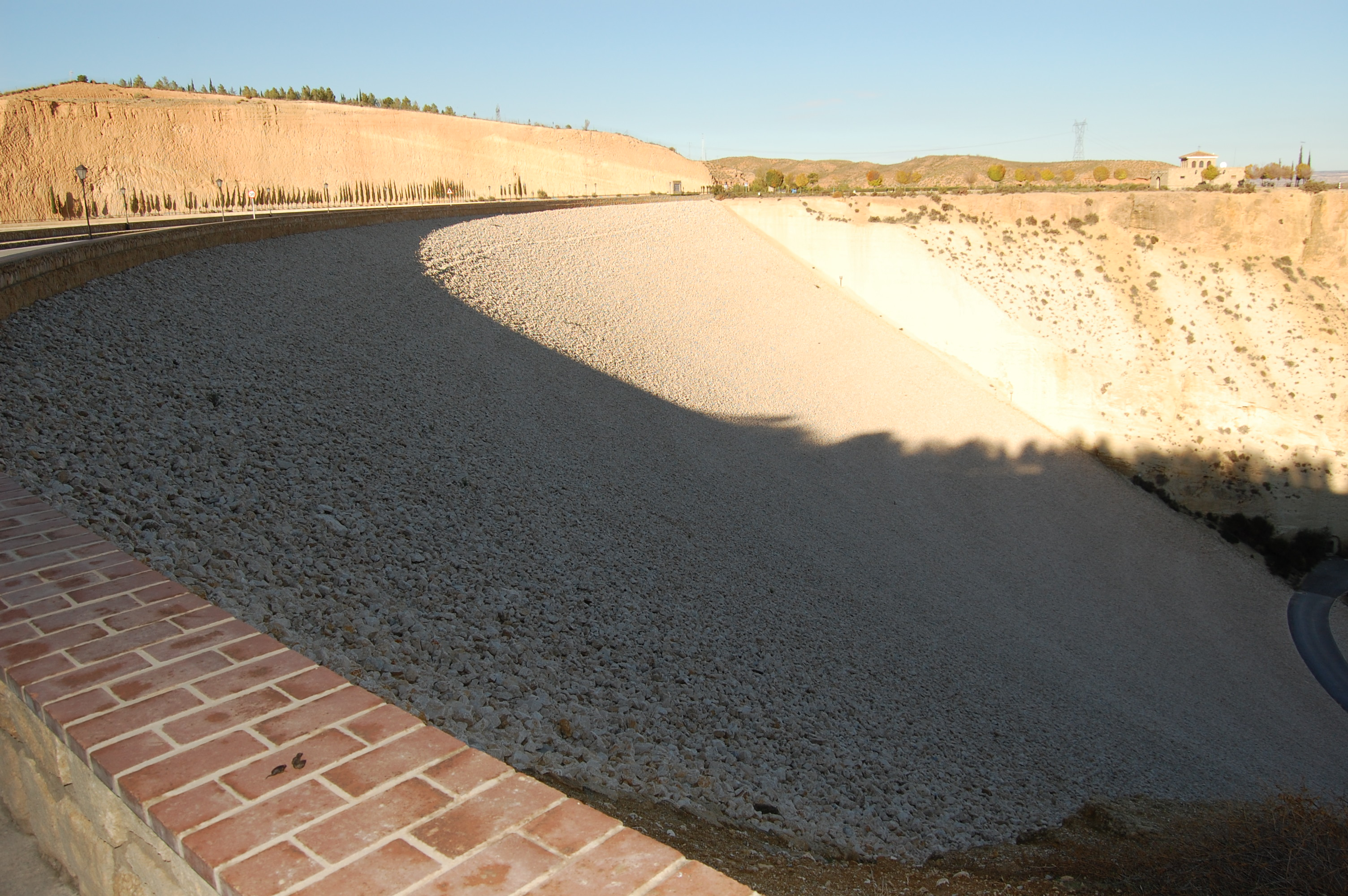 MURO DE LA PRESA "FRANCISCO ABELLAN"